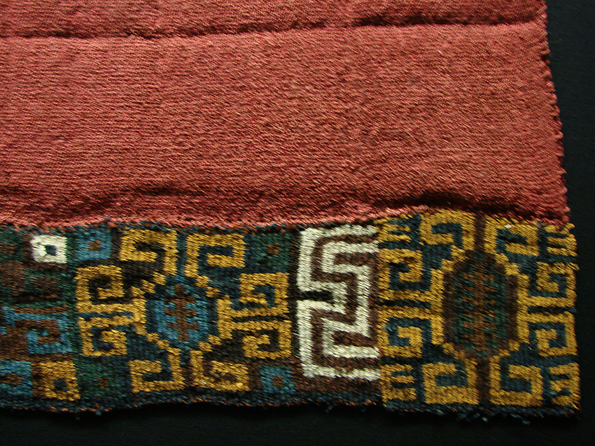 Tissu de la culture Chancay (1200-1450 + JC). Il s'agit d'une des cultures pré-Inca, située au Pérou.Musée d'Auch.